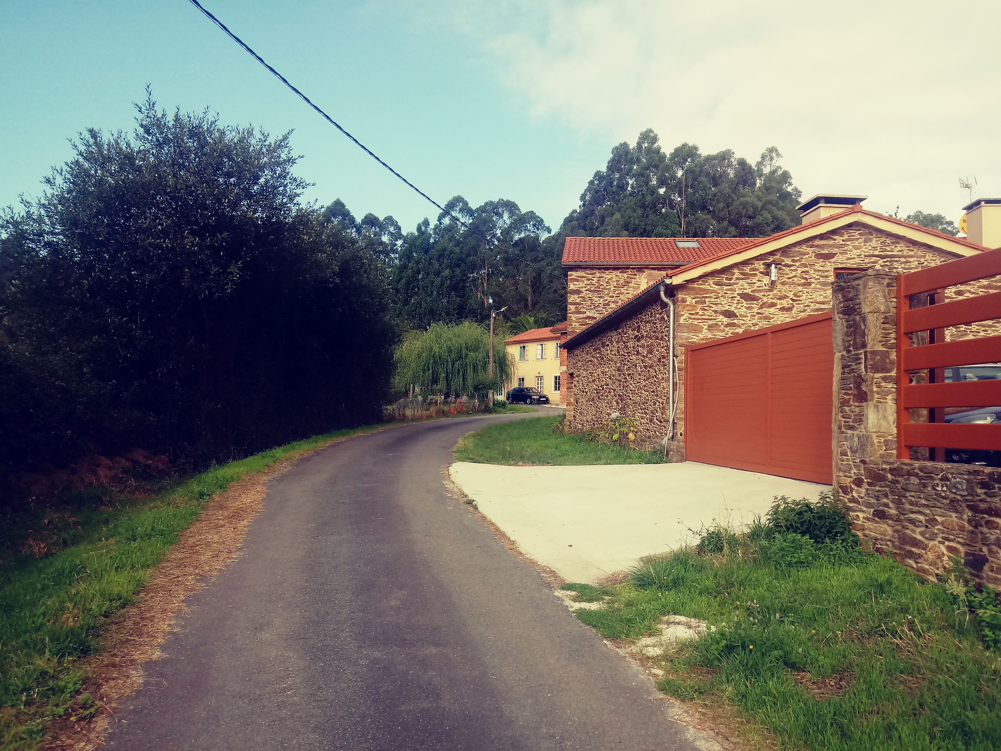 Casas en Alvite, Pereira, coas paredes feitas con lousas en mampostaría